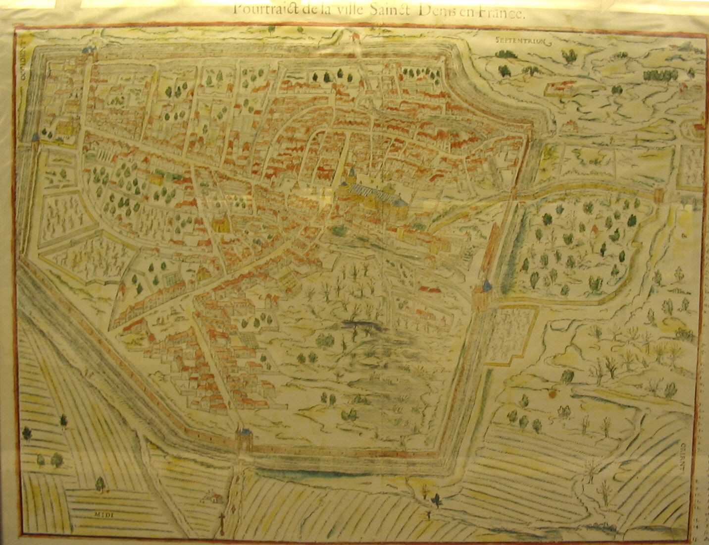 Carte historique de Saint-Denis affichée dans la station de métro Saint-Denis Basilique. Je suis l'auteur du cliché pris en 2005 Historical map of Saint-Denis (Seine-Saint-Denis, France) taken in the subway station "Saint-Denis Basilique"